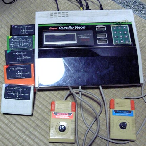 エポック社スーパーカセットビジョン本体とカセット